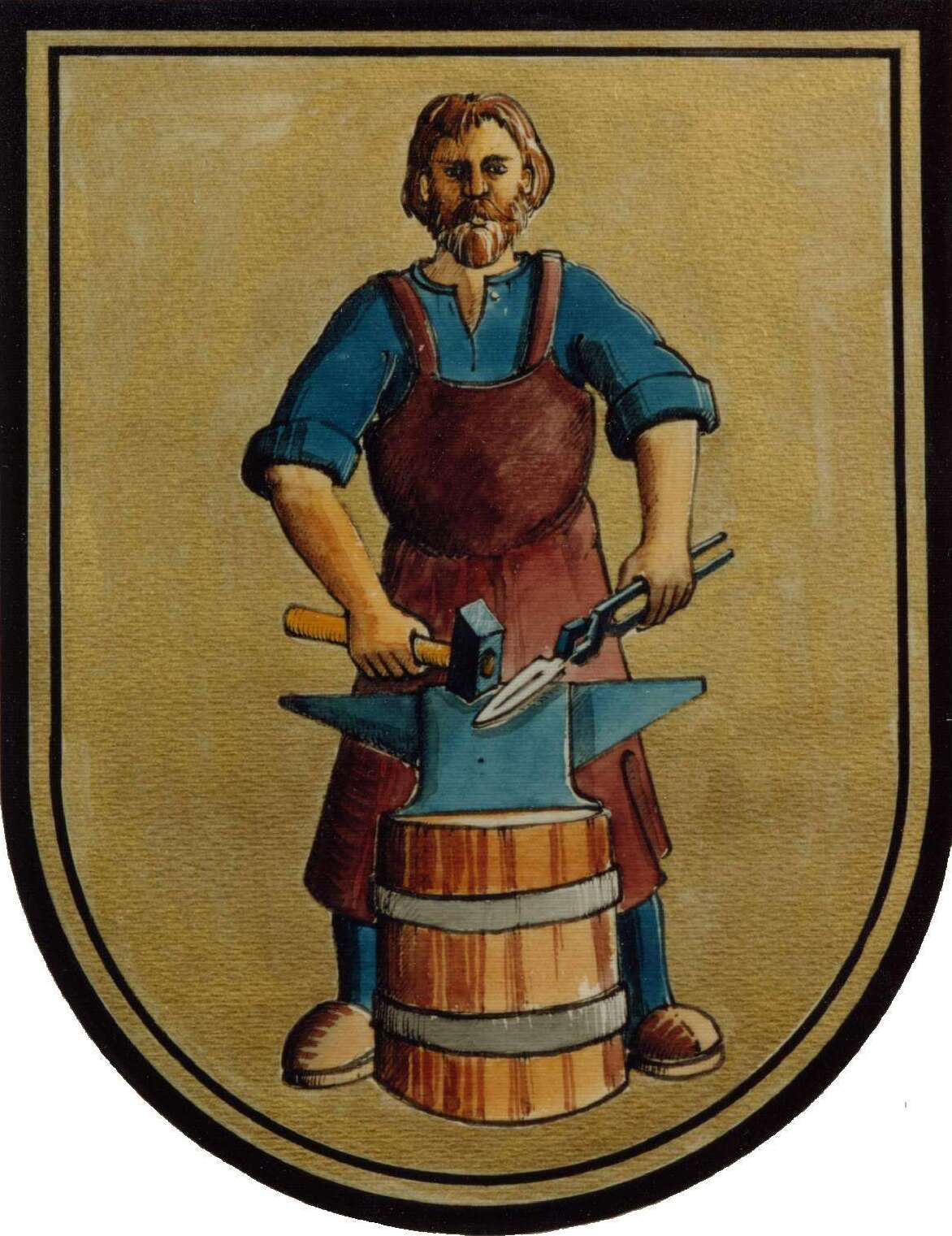 Aktuelles Wappen der Stadt Ruhla